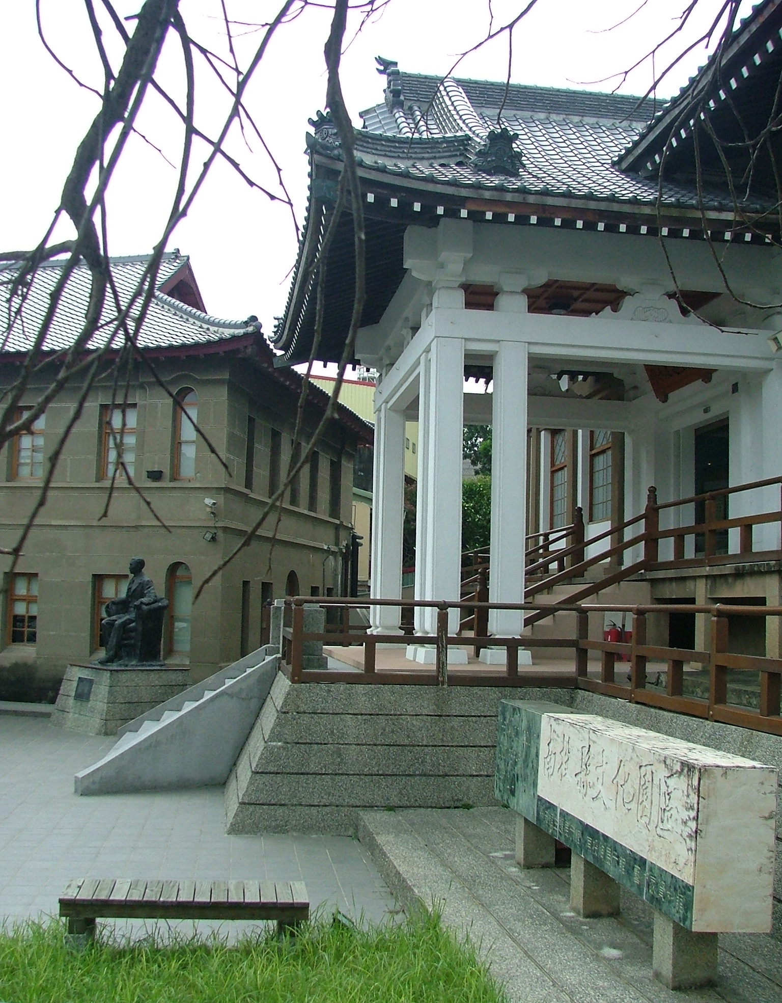 南投縣縣史圖書文獻室